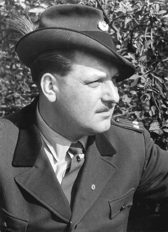 Revierförster, Schriftstellen, Helmut Sakowski ZB-Biscan-14.9.1959 Uraufführung in Falberstadt. "Die Entscheidung der Lene Mattke" Am Volkstheater Falberstadt wird am 14. Sptember 59 Helmut Sakowskis Schauspiel "Die Entscheidung der Lene Mattke" uraufgeführt. Sakowski ist Revierförster in Krumke bei Osterburg. Das Stück wird während der Berliner Festtage in Berlin aufgeführt. UBz: Helmut Sakowski, Revierföster und Schriftsteller.